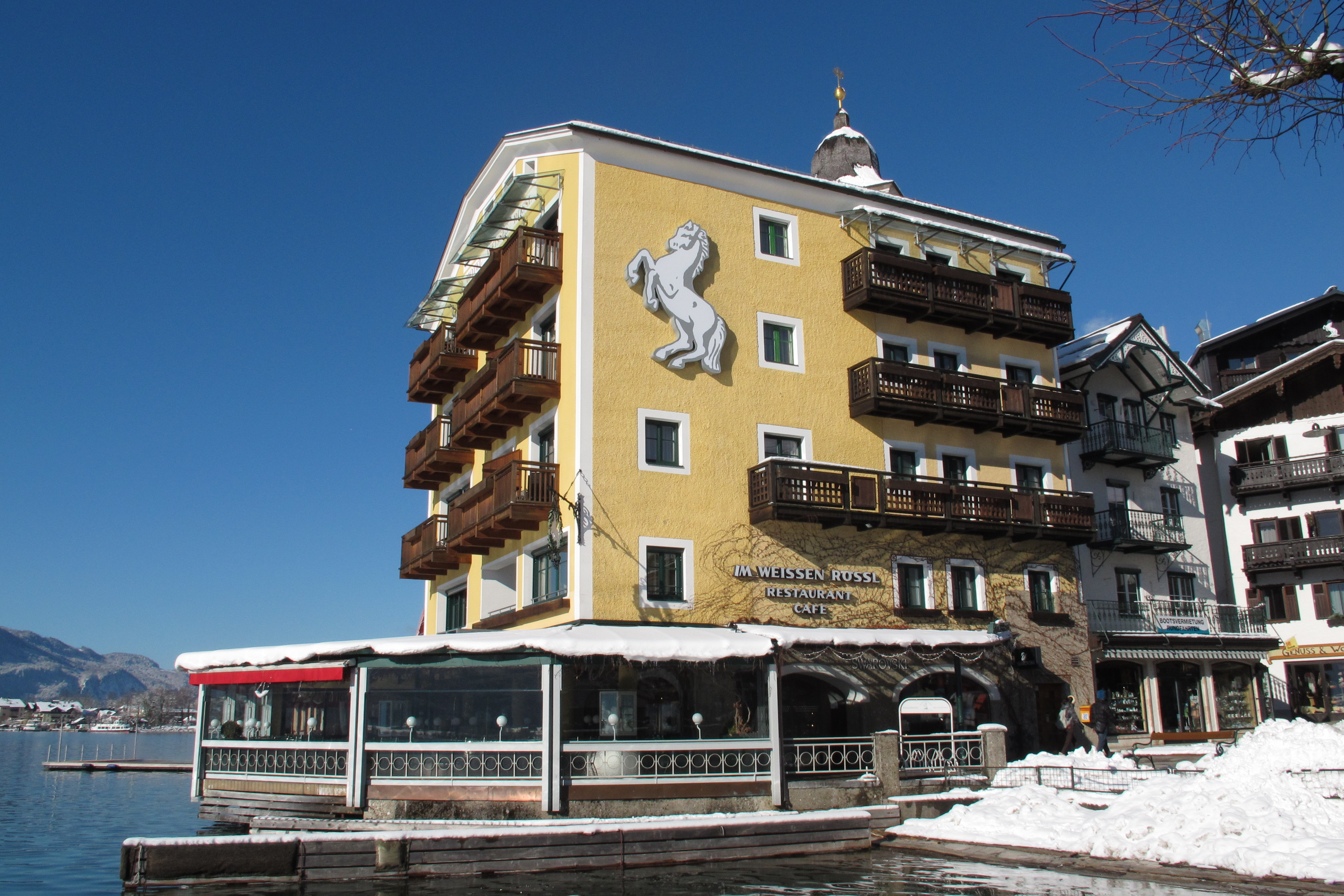 Im Weissen Rössl in Sankt Wolfgang